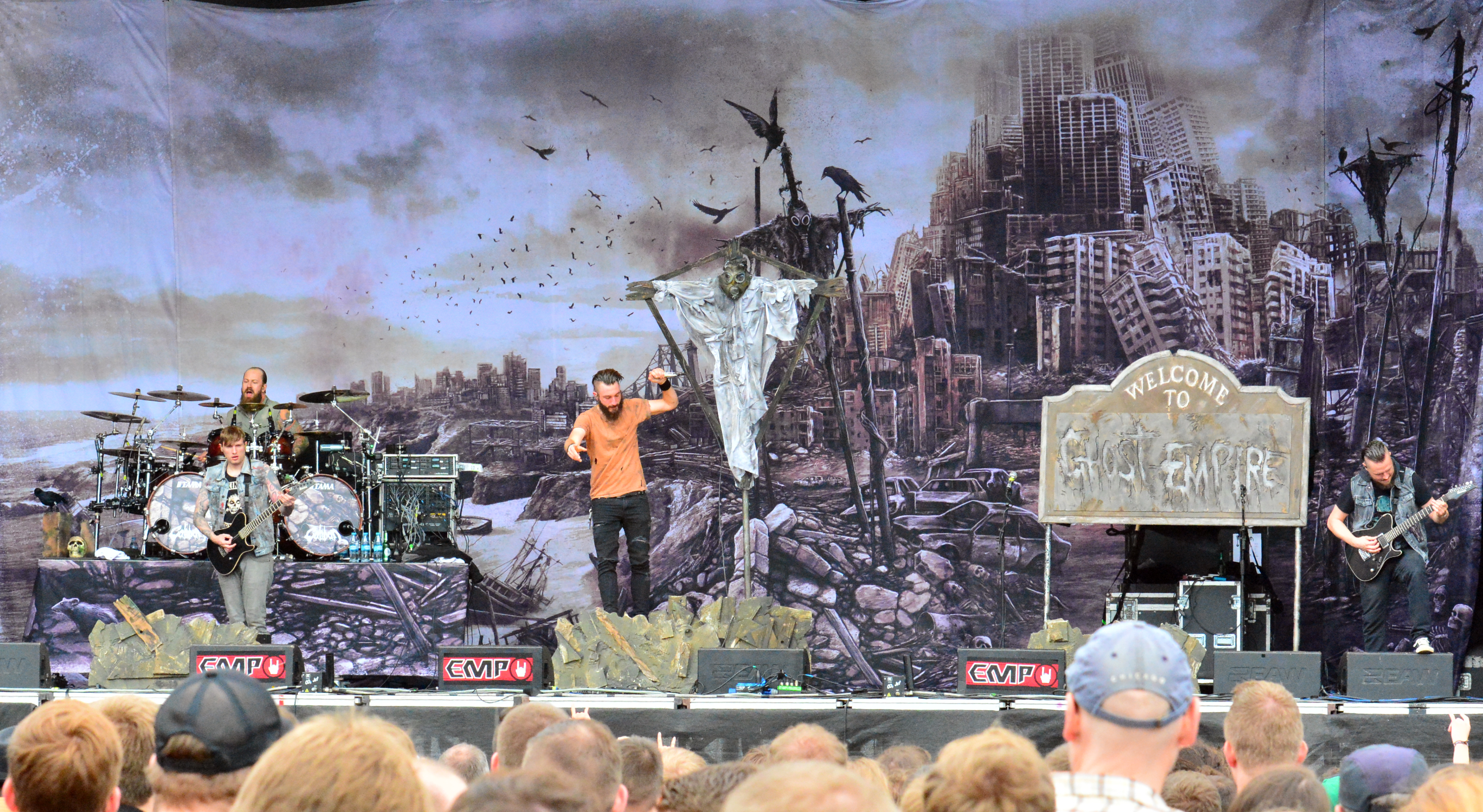 Caliban beim Elbriot 2014